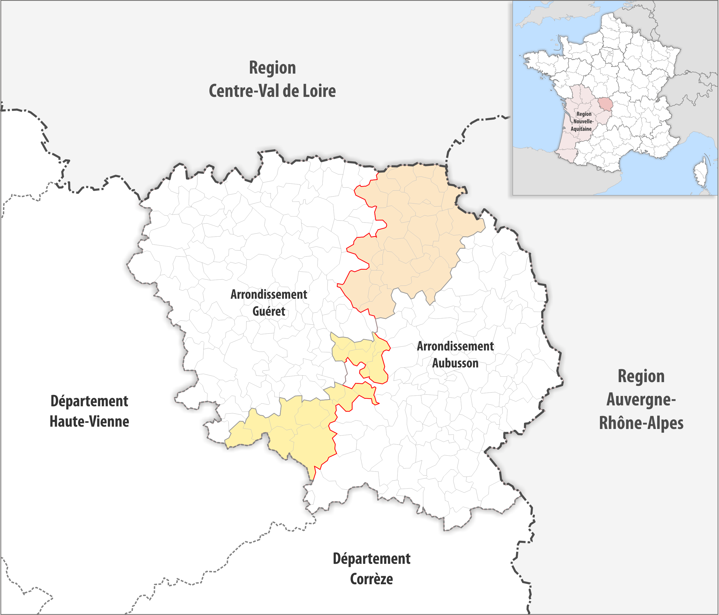 Arrondissements Anpassungen auf 2017 im Departement Creuse